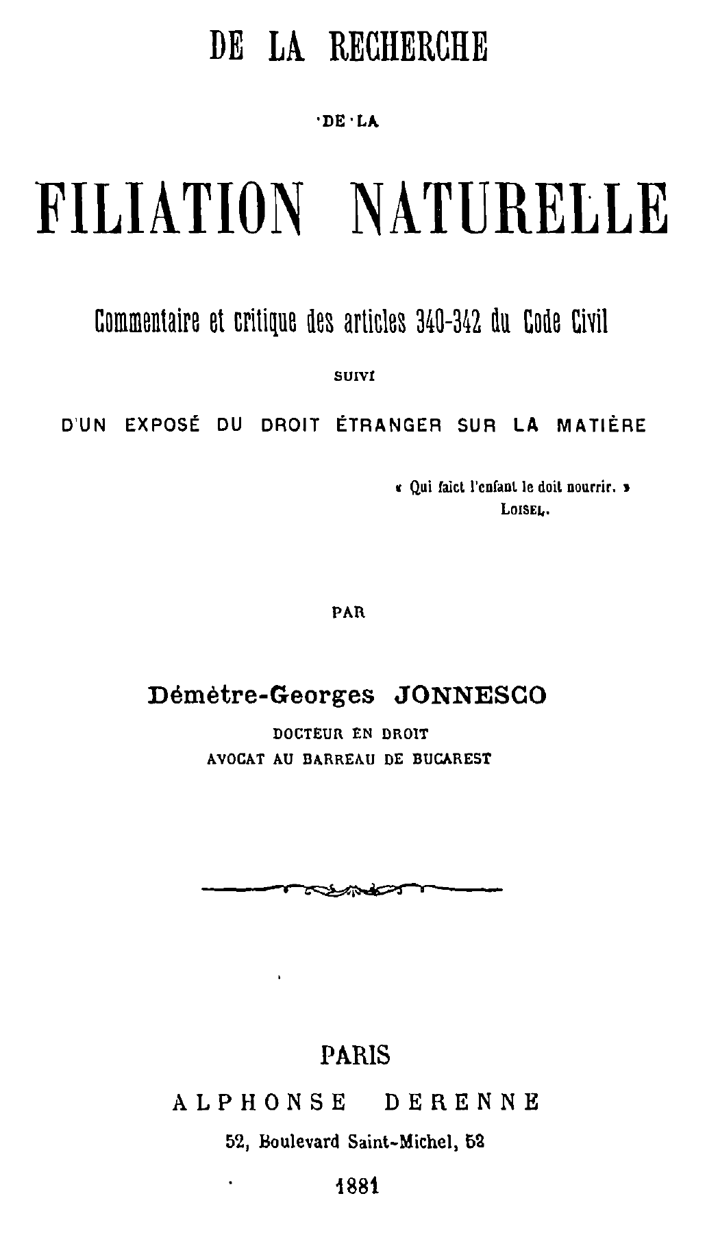 Take Ionescu - Teza de doctor în drept al Universităţii din Paris